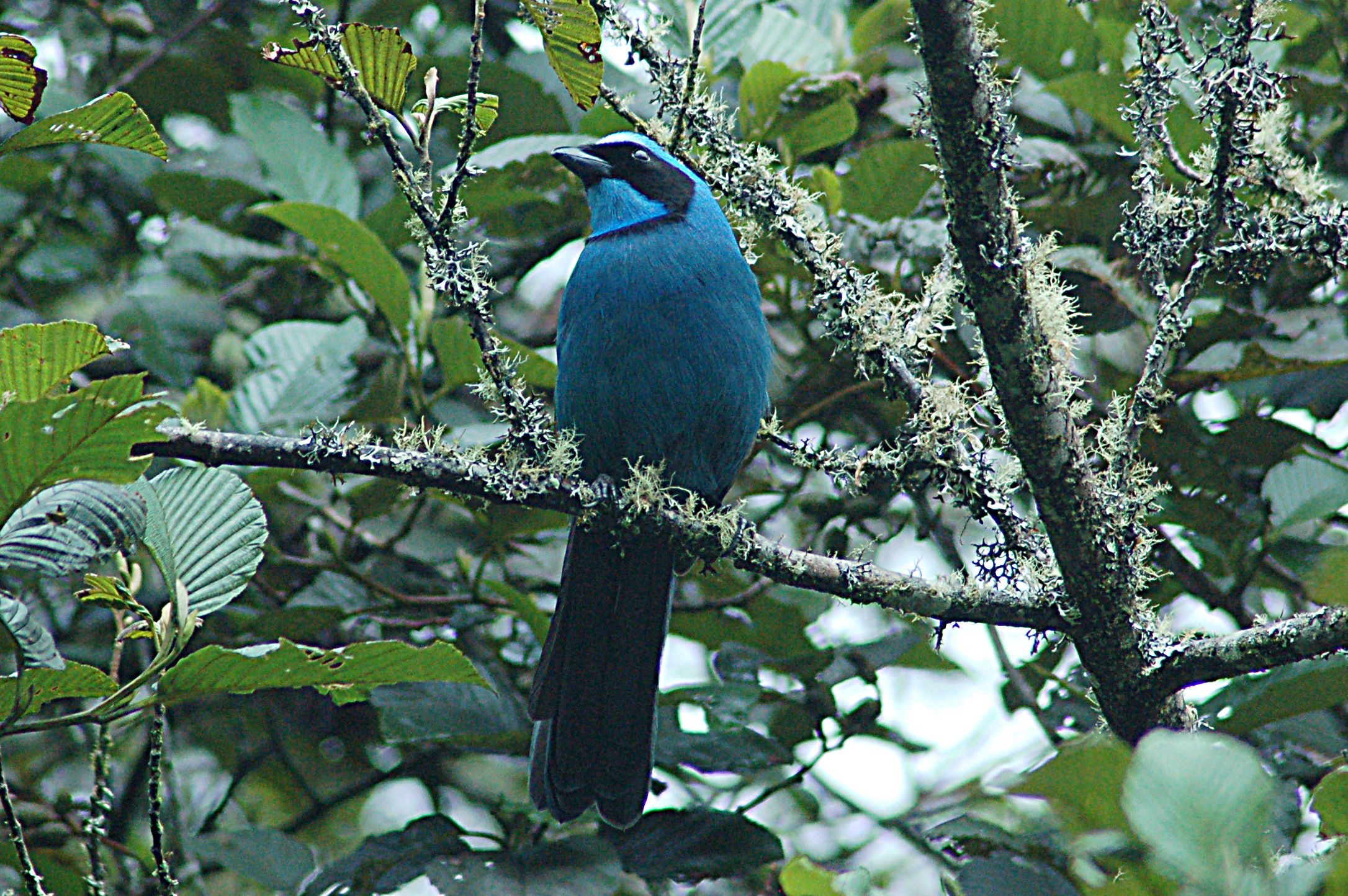 Turquoise Jay (Cyanolyca turcosa) - 16 June 2015 - Guango Lodge, Napo Province, Ecuador